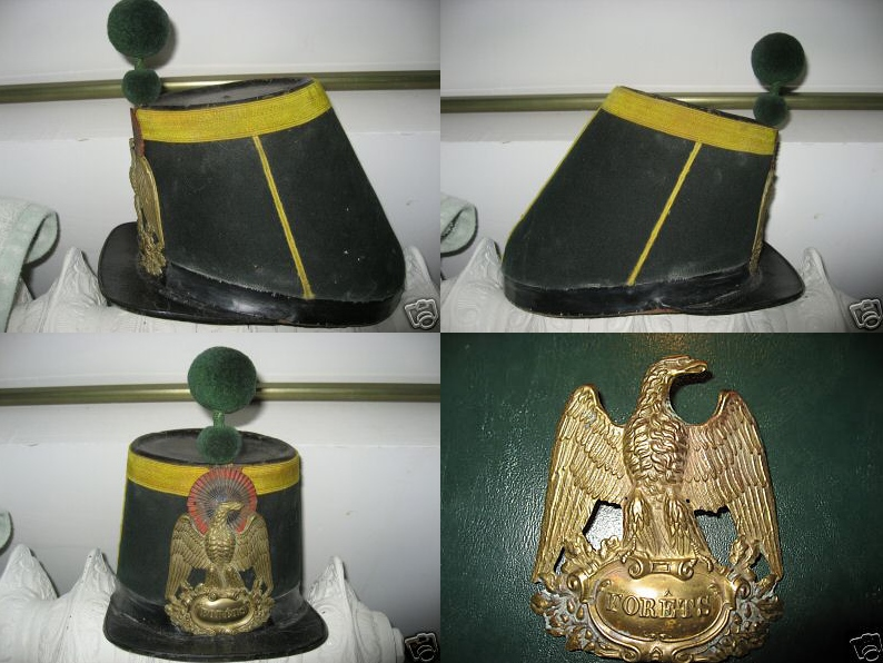 Shako de garde forestier de l'Administration des forêts du Template:2nd Empire.